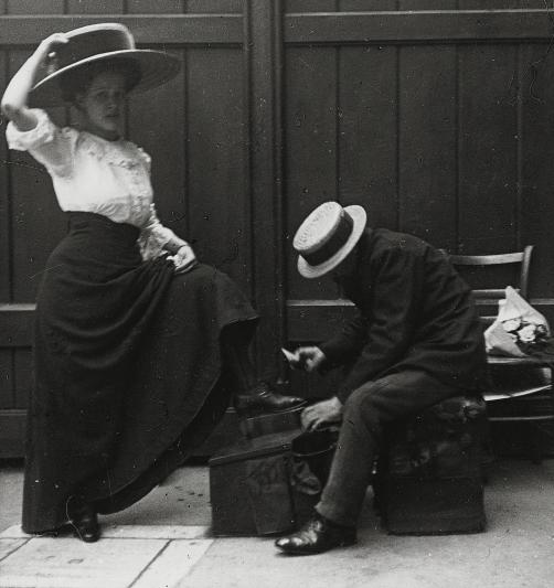 Schuhputzer vor der Bauhütte am Stephansplatz; Photographie aus Wien